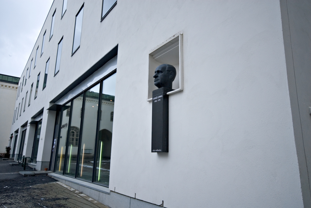 Statue of Väinö Linna. Caption says "aika velikultia".